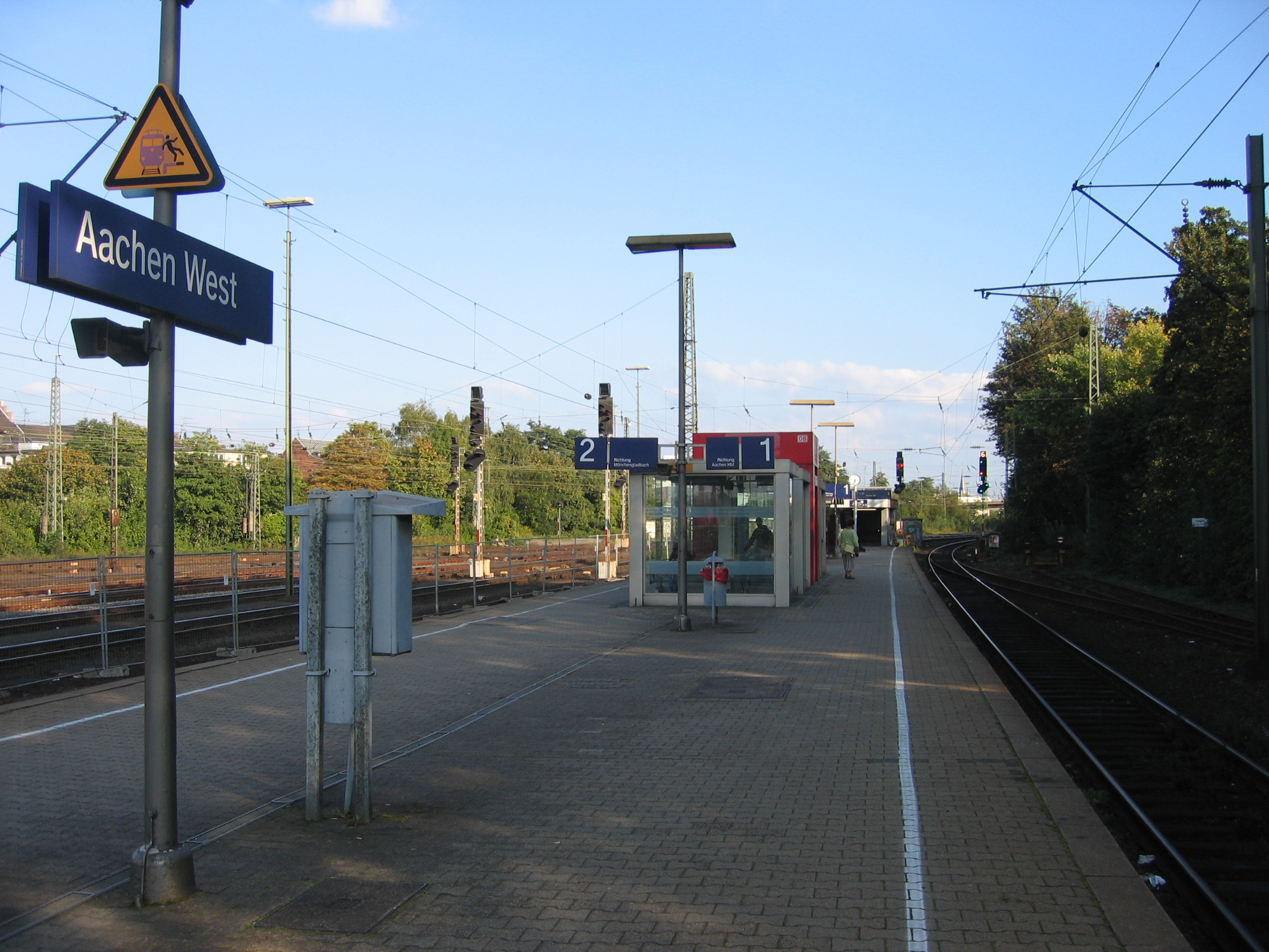 Bahnhof Aachen West